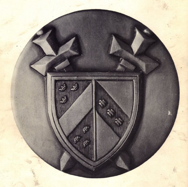 Amicale des anciens de la Brigade Alsace LOrraine